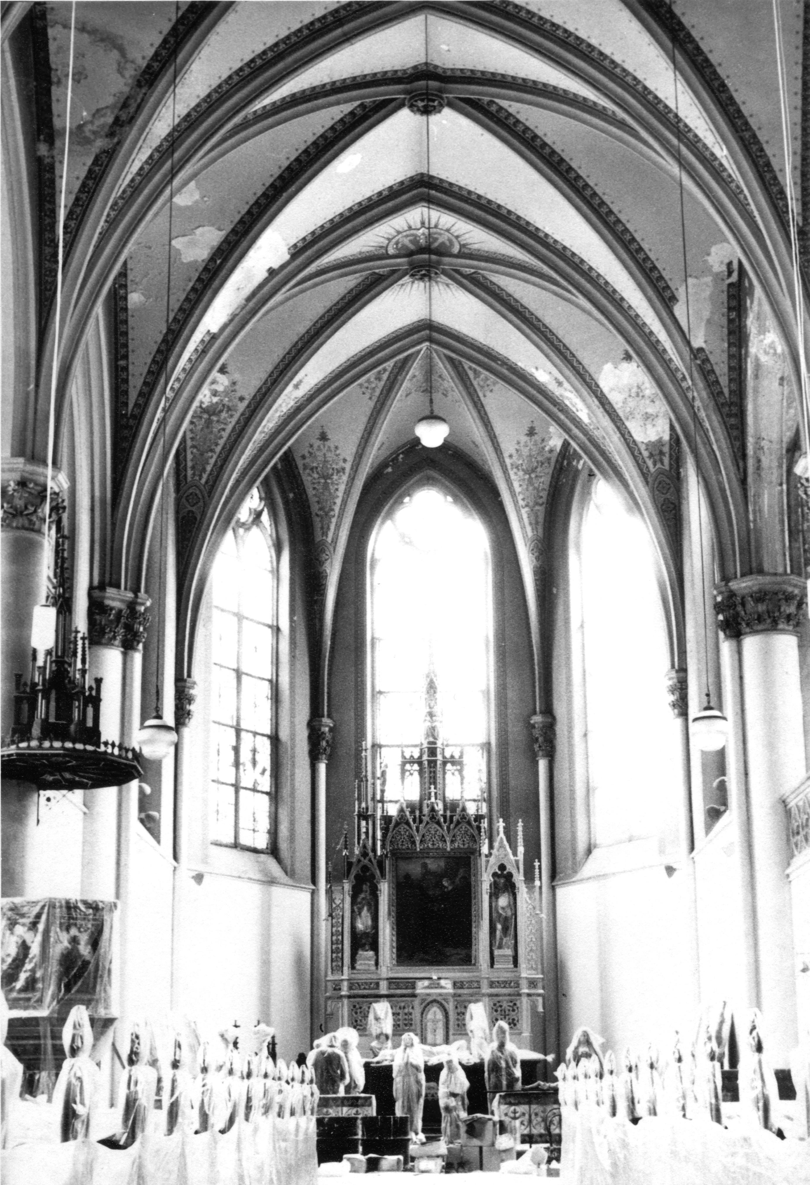 Pohled do hlavní lodi kostela. Snímek pochází z let 1967 až 69, kdy byl kostel zachráněn od demolice. V této době probíhalo statické zajištění kostela. Na snímku je hezky vidět původní výmalba klenby kostela, presbytář je již přemalován bílou barvou.